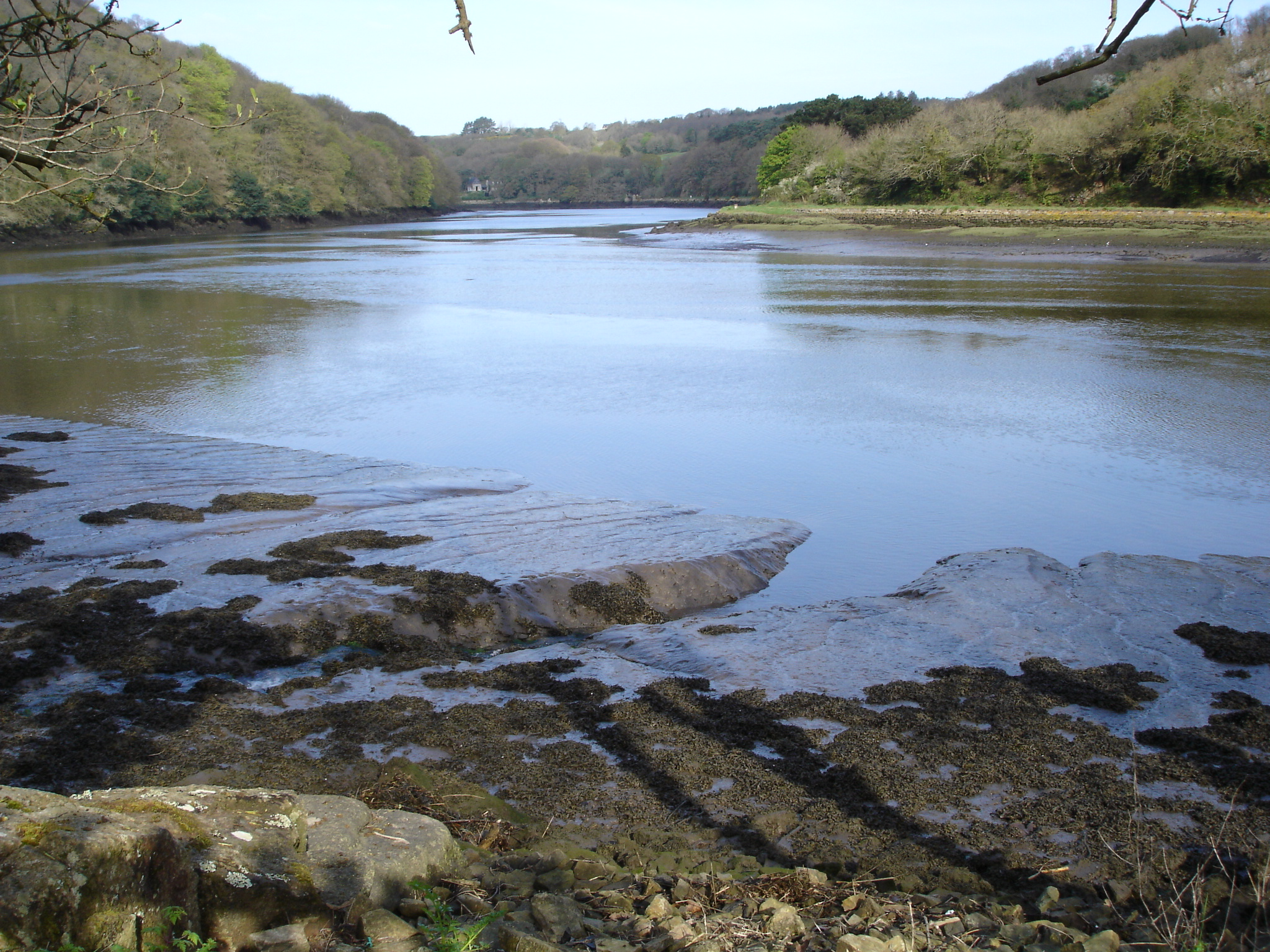 L'estuaire du Léguer depuis le sentier côtier rive gauche -- Photo amateur prise par moi-même